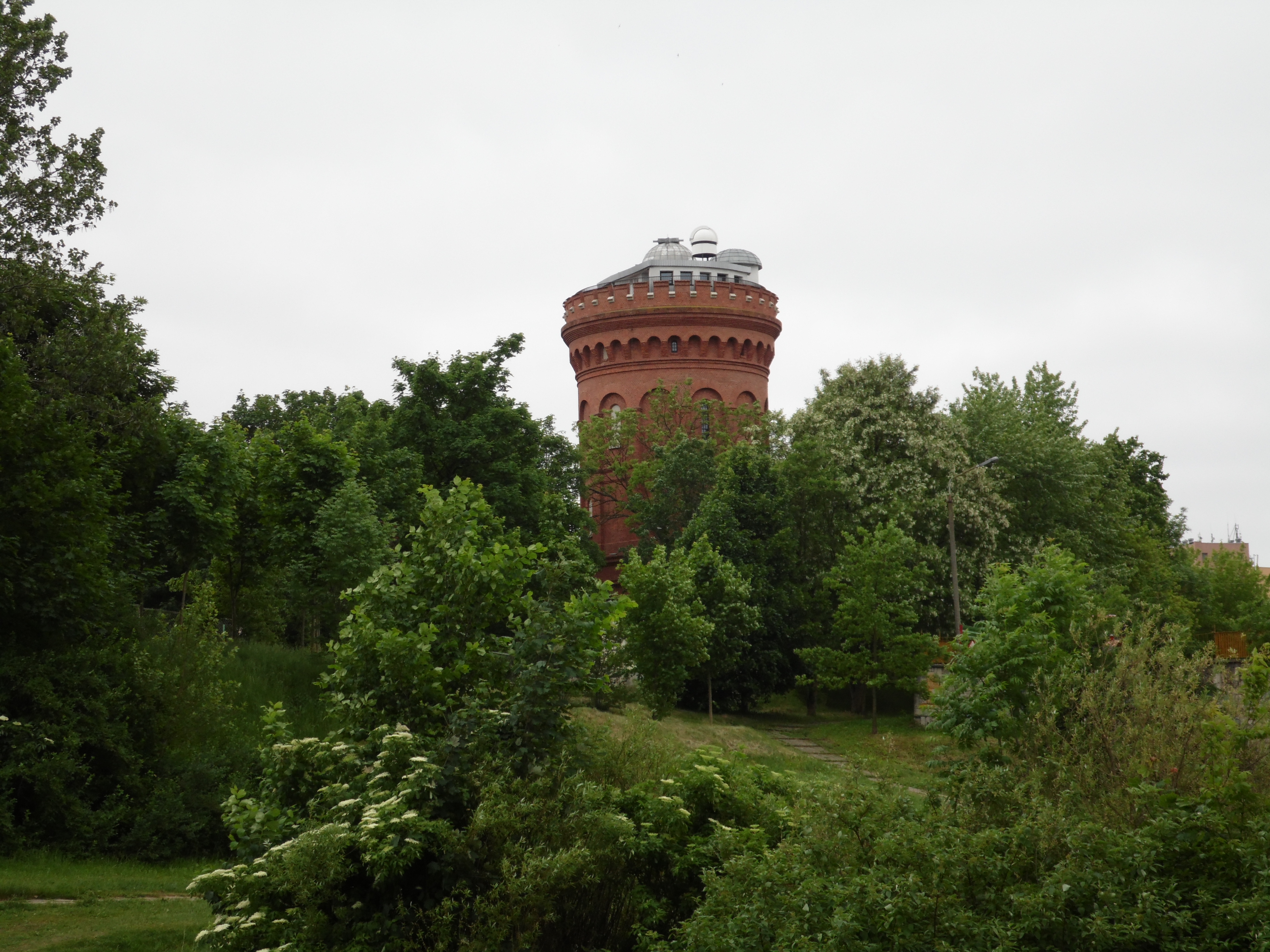 DAWNA WIEŻA CIŚNIEŃ. OBECNIE OBSERWATORIUM ASTRONOMICZNE.